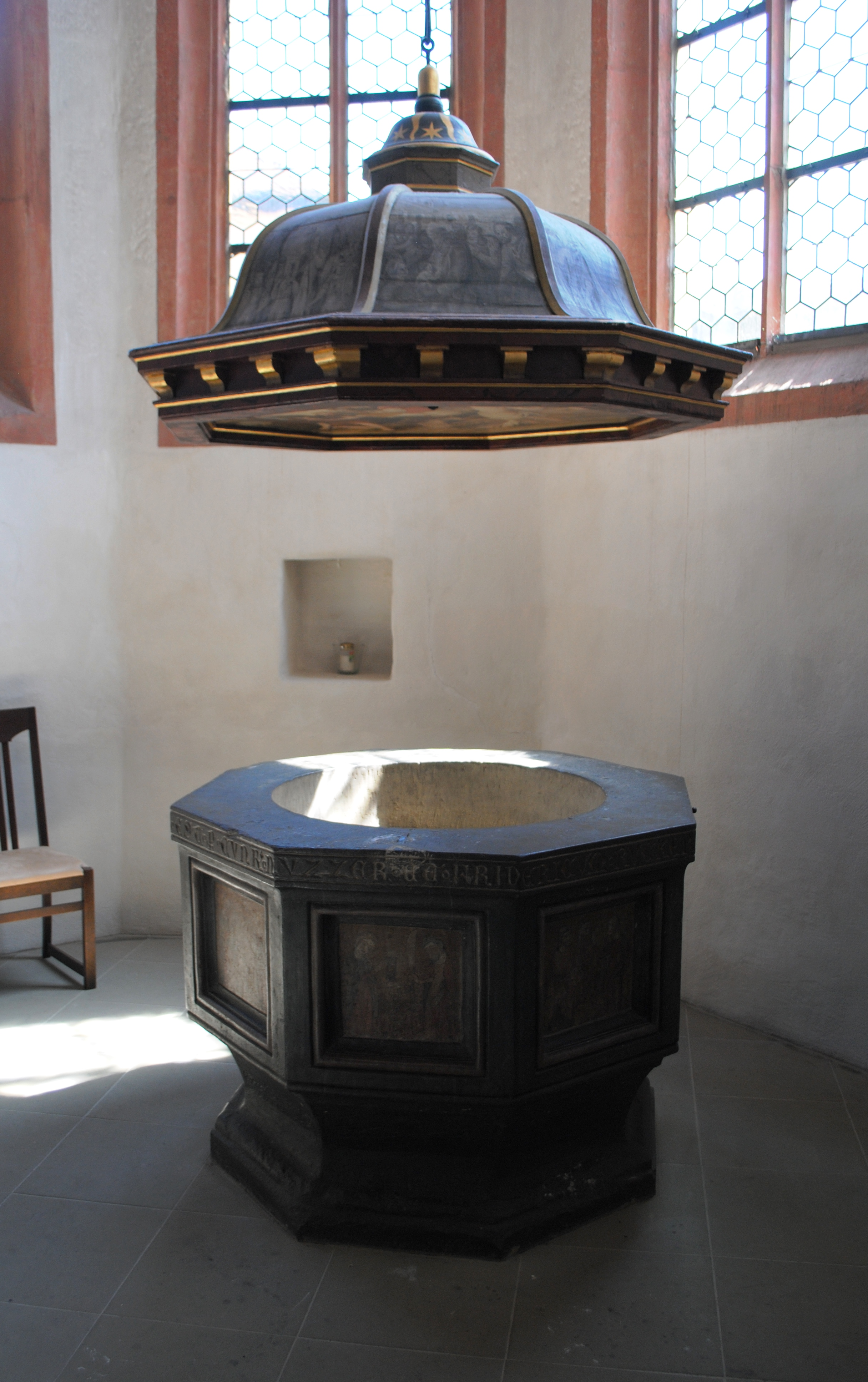 Taufstein, St. Johanniskirche, Schweinfurt